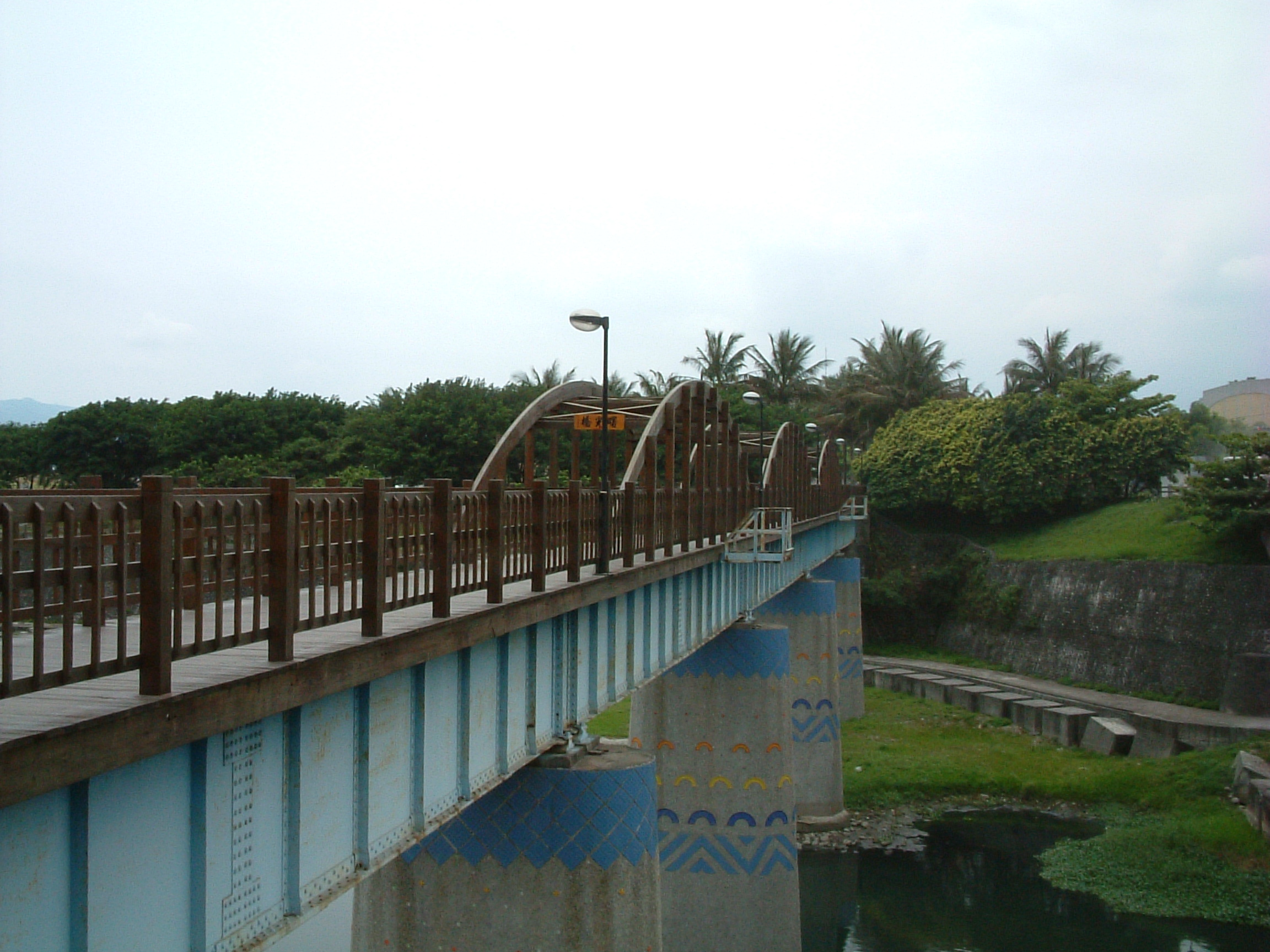 台灣花蓮市的曙光橋，地點在花蓮女中附近 User:pinc拍攝